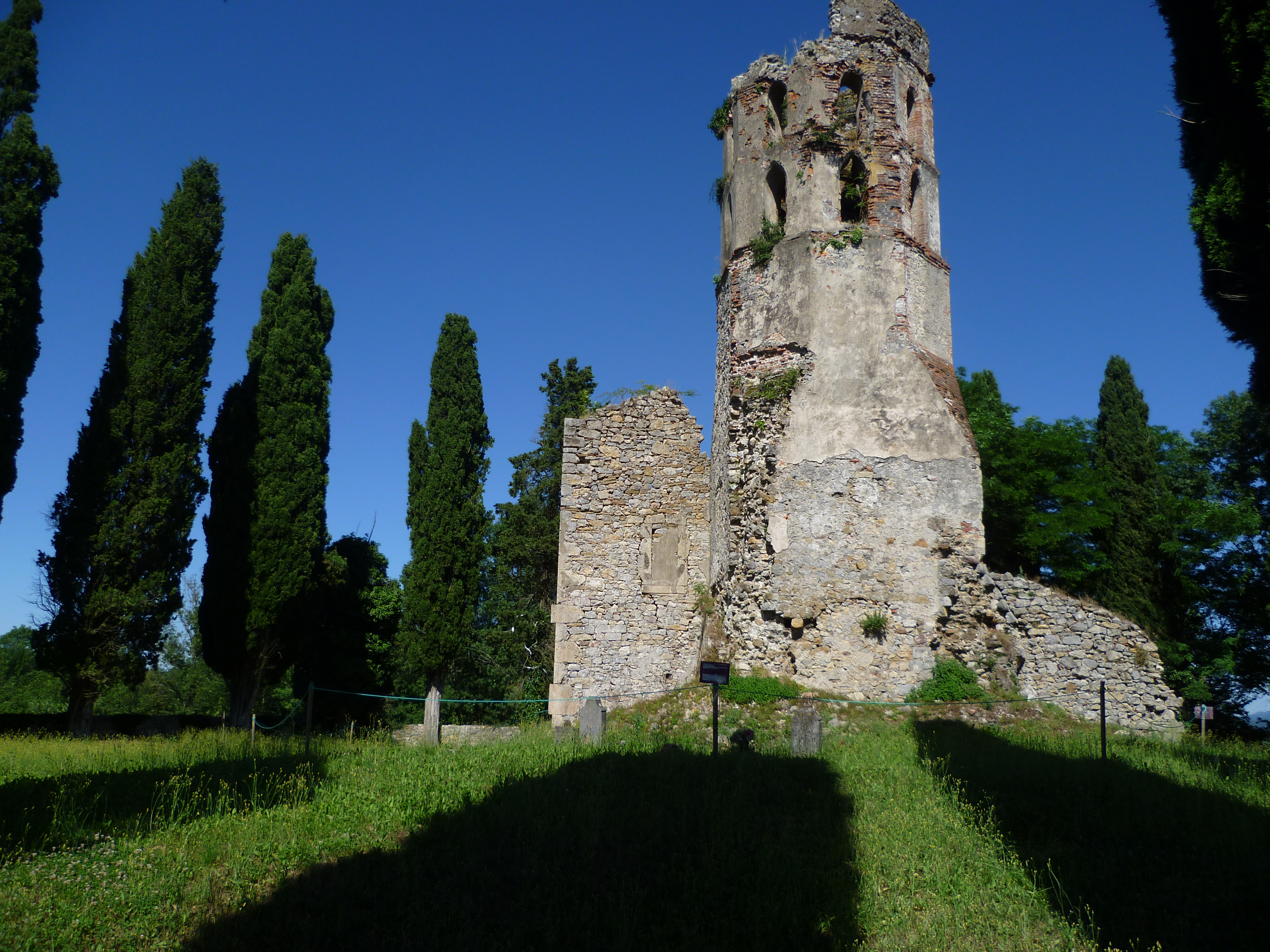 Église de Noguès à Lescure, Ariège.